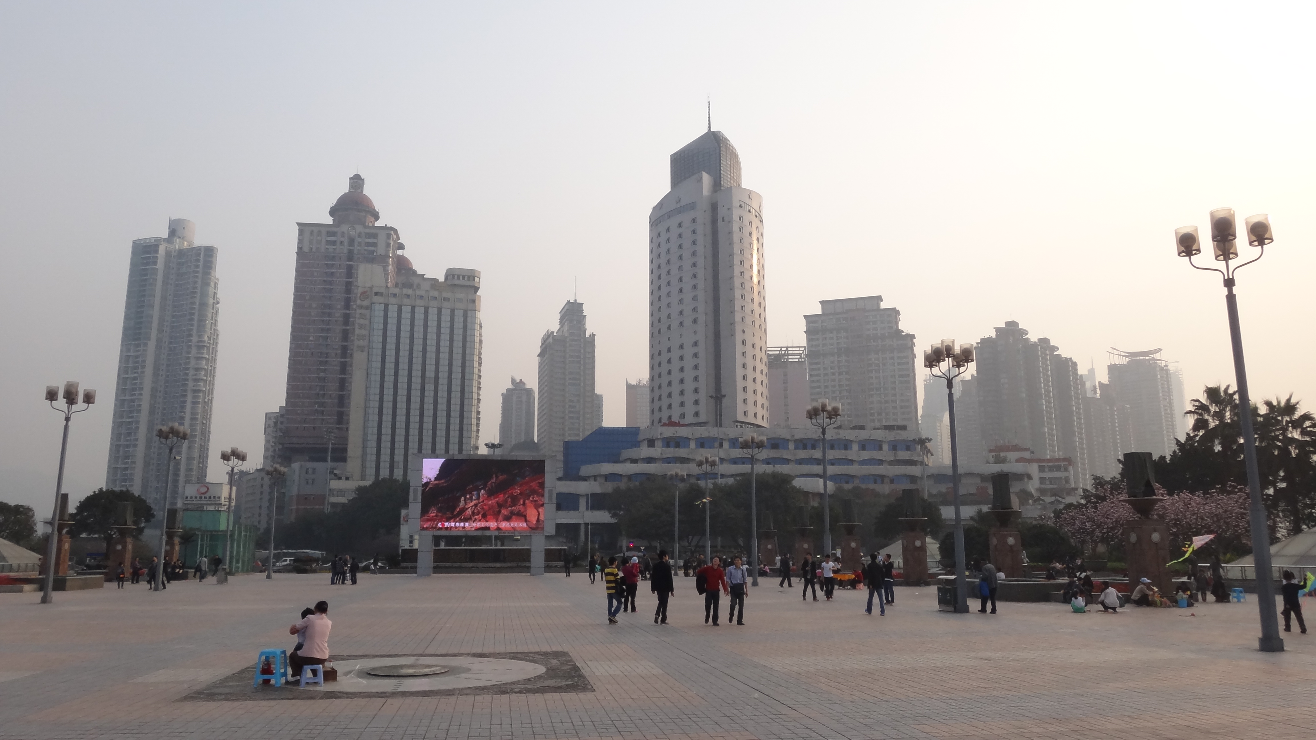 配合朝天门地区的改造工程，重庆港等几栋建筑物即将会被拆卸